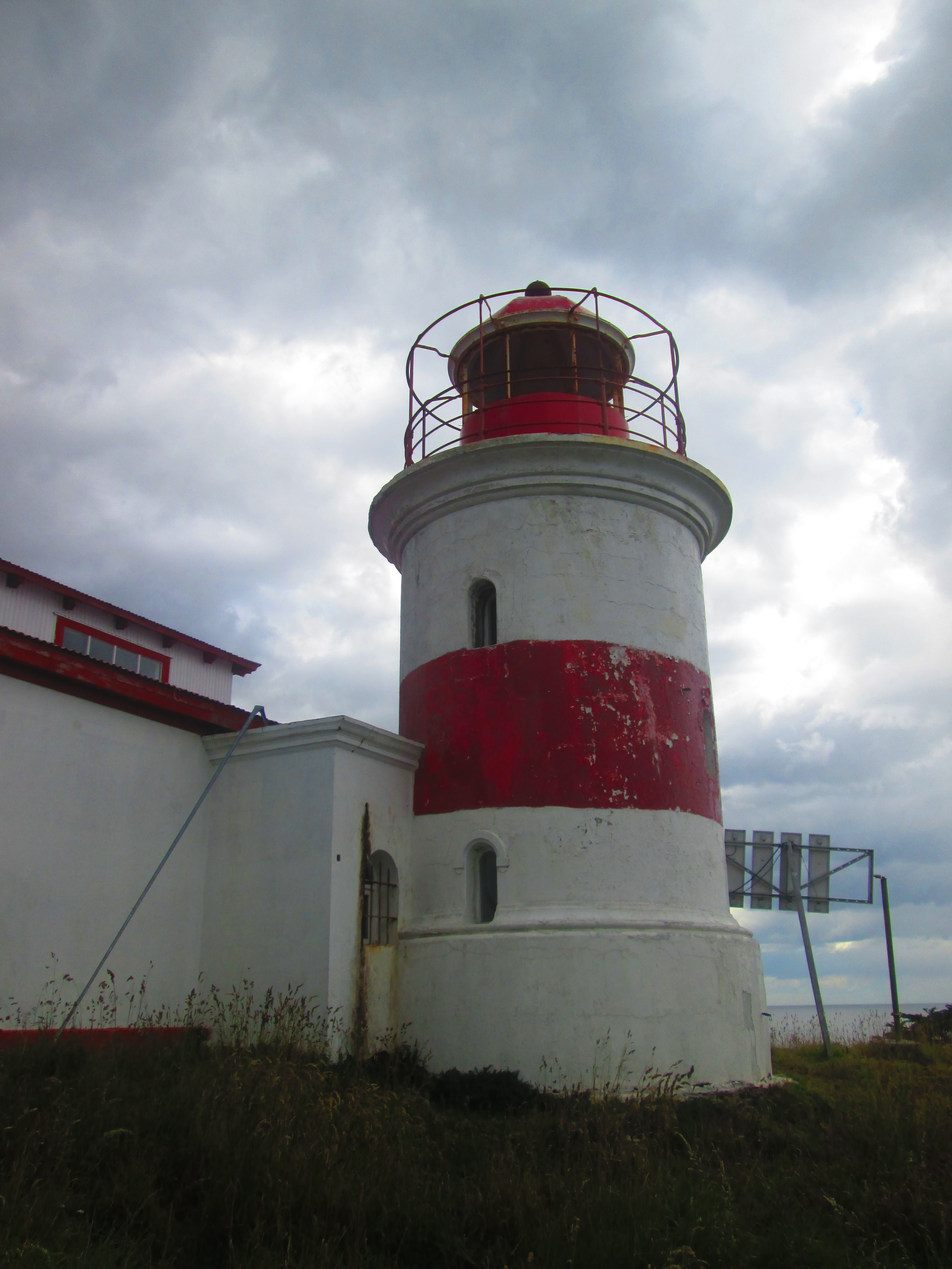 Vista cercana del Faro San Isidro